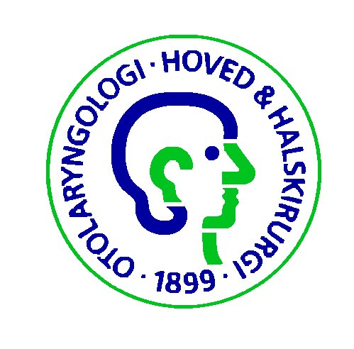 DSOHH logo fra 1991